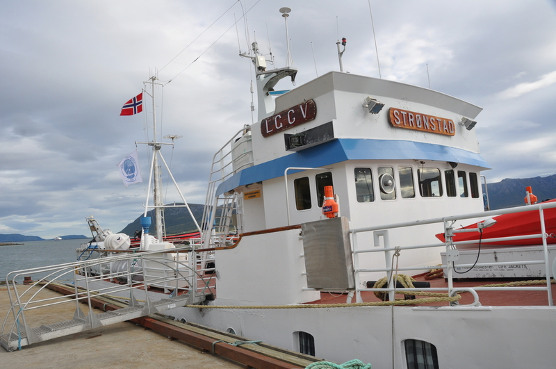 Passenger ship Strønstad in Skjoldehamn, Norway